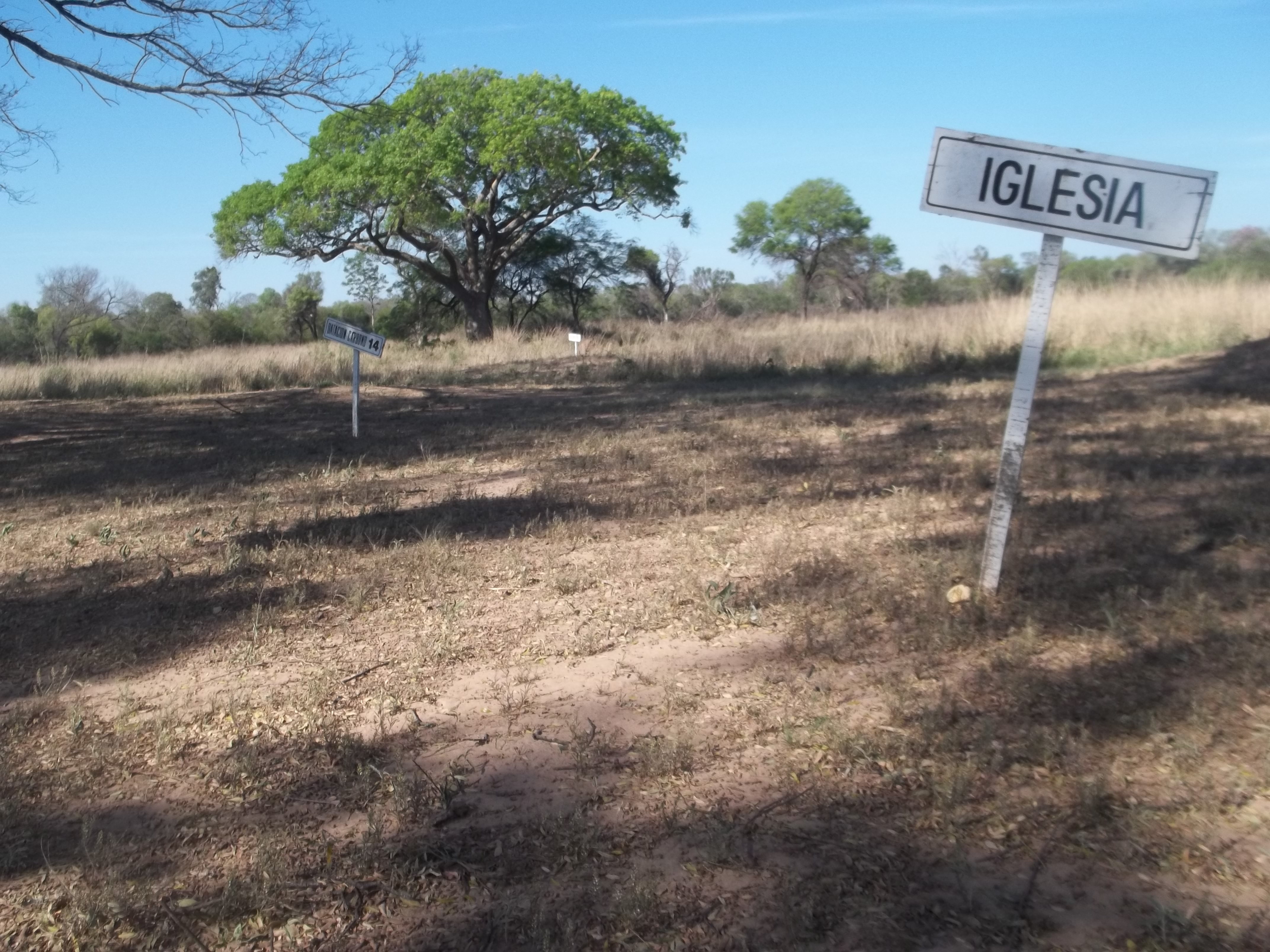 Cartel indicativo de la ubicación de la iglesia en el as Ruinas del Km 75